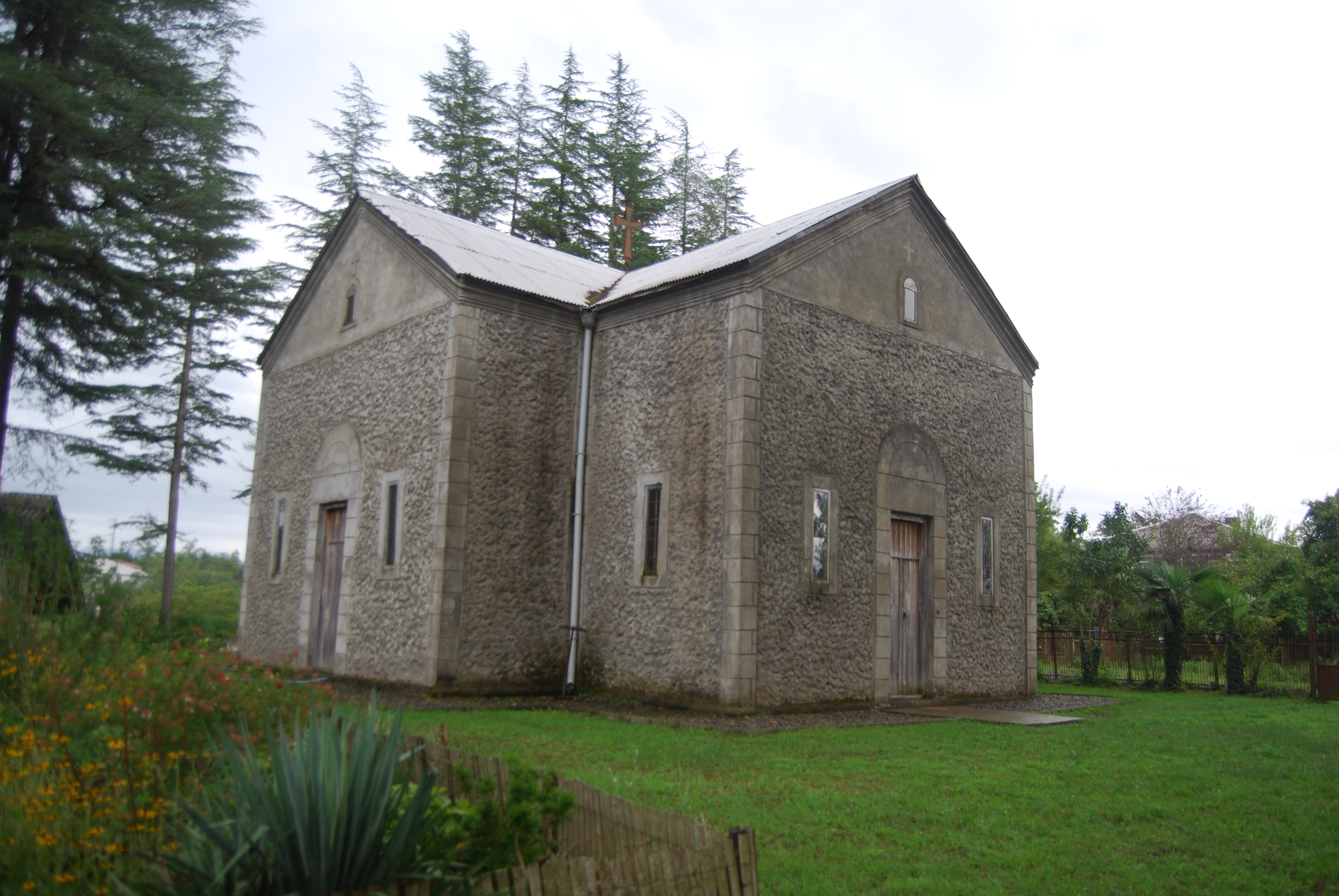 წმინდა მარინეს სახელობის ეკლესია